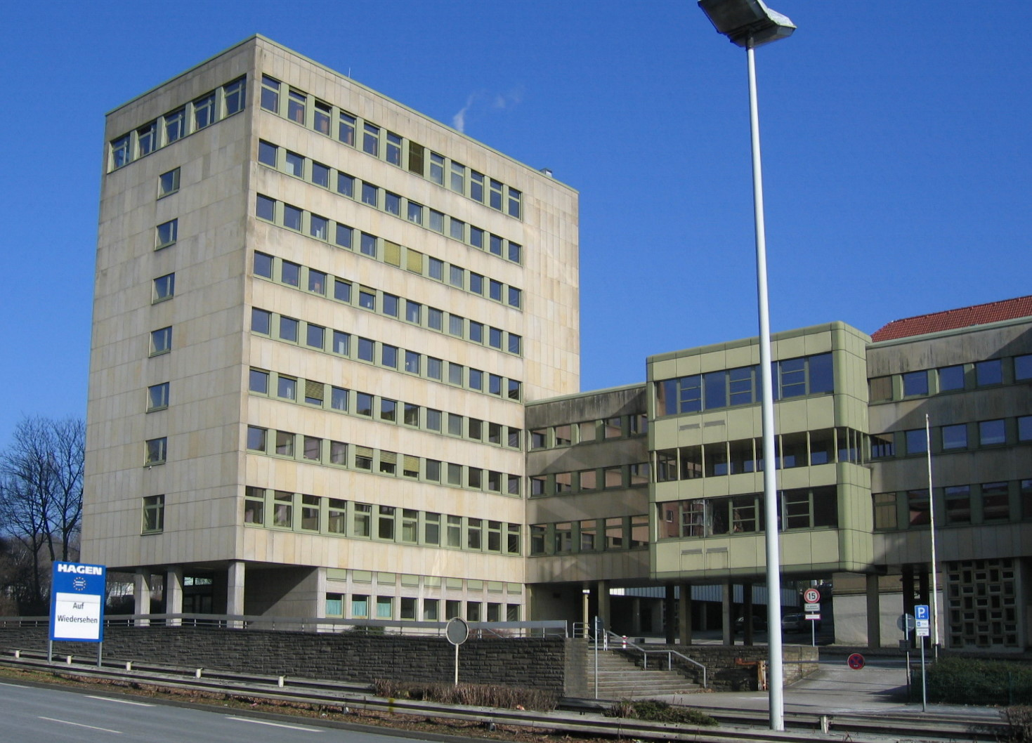 Description: Arbeitsgericht Hagen, Heinitzstr. 44 in Hagen Source: selbst fotografiert Date: 19. März 2006 Author: Bubo